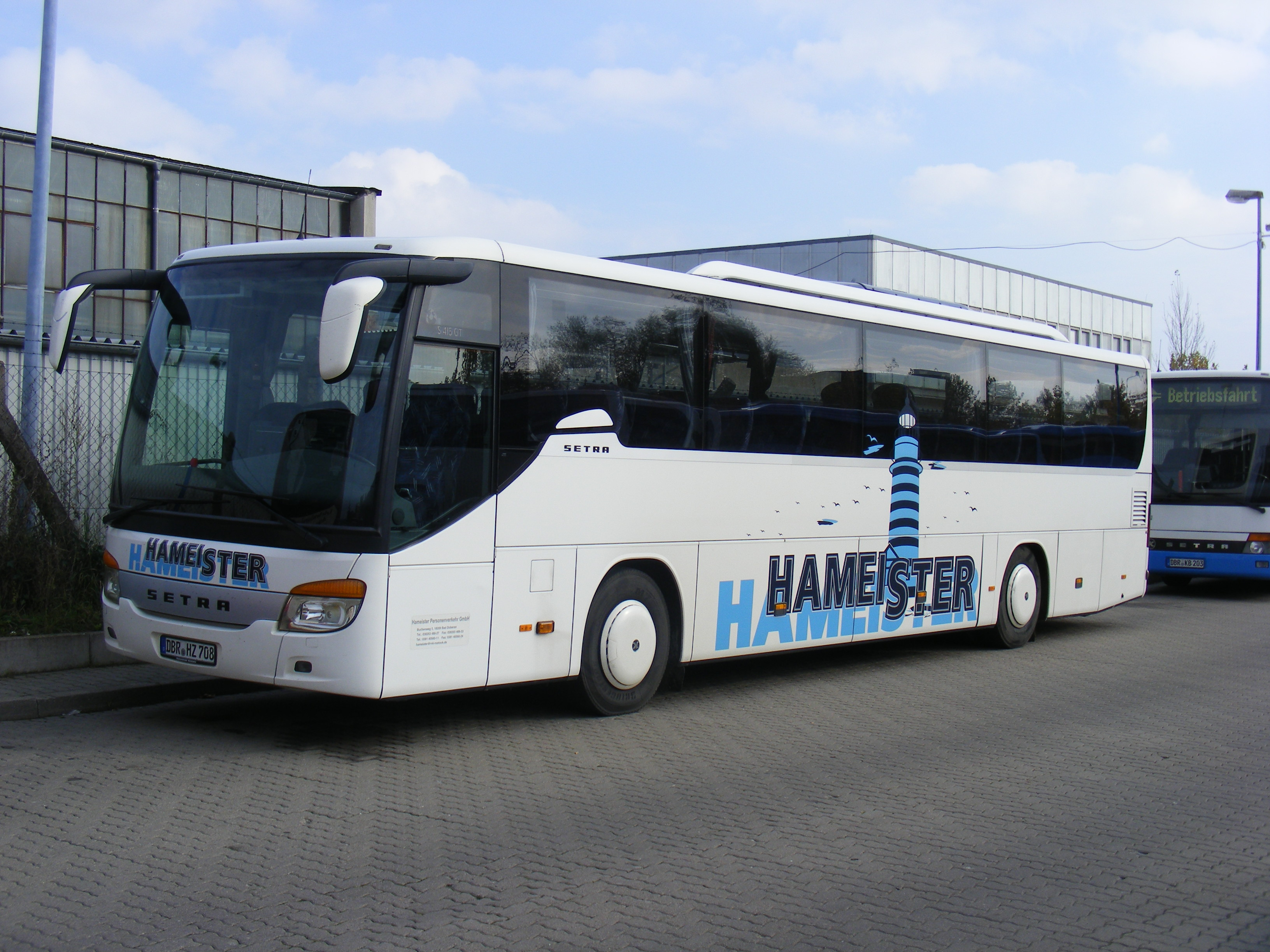 Rostock Busbahnhof